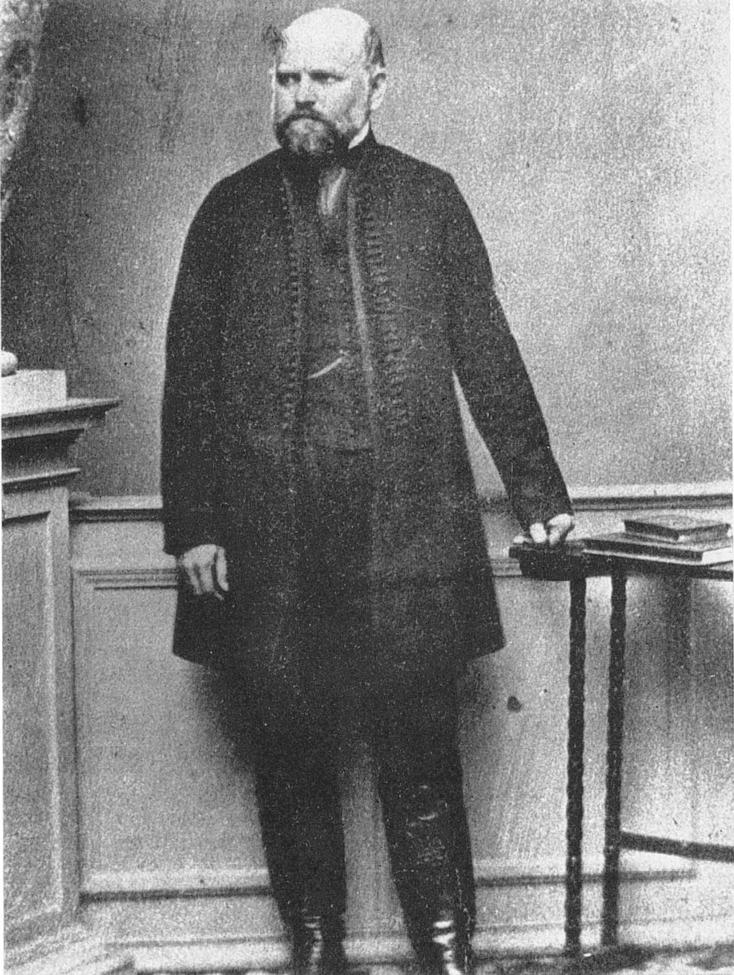 Ignaz Semmelweis 1863